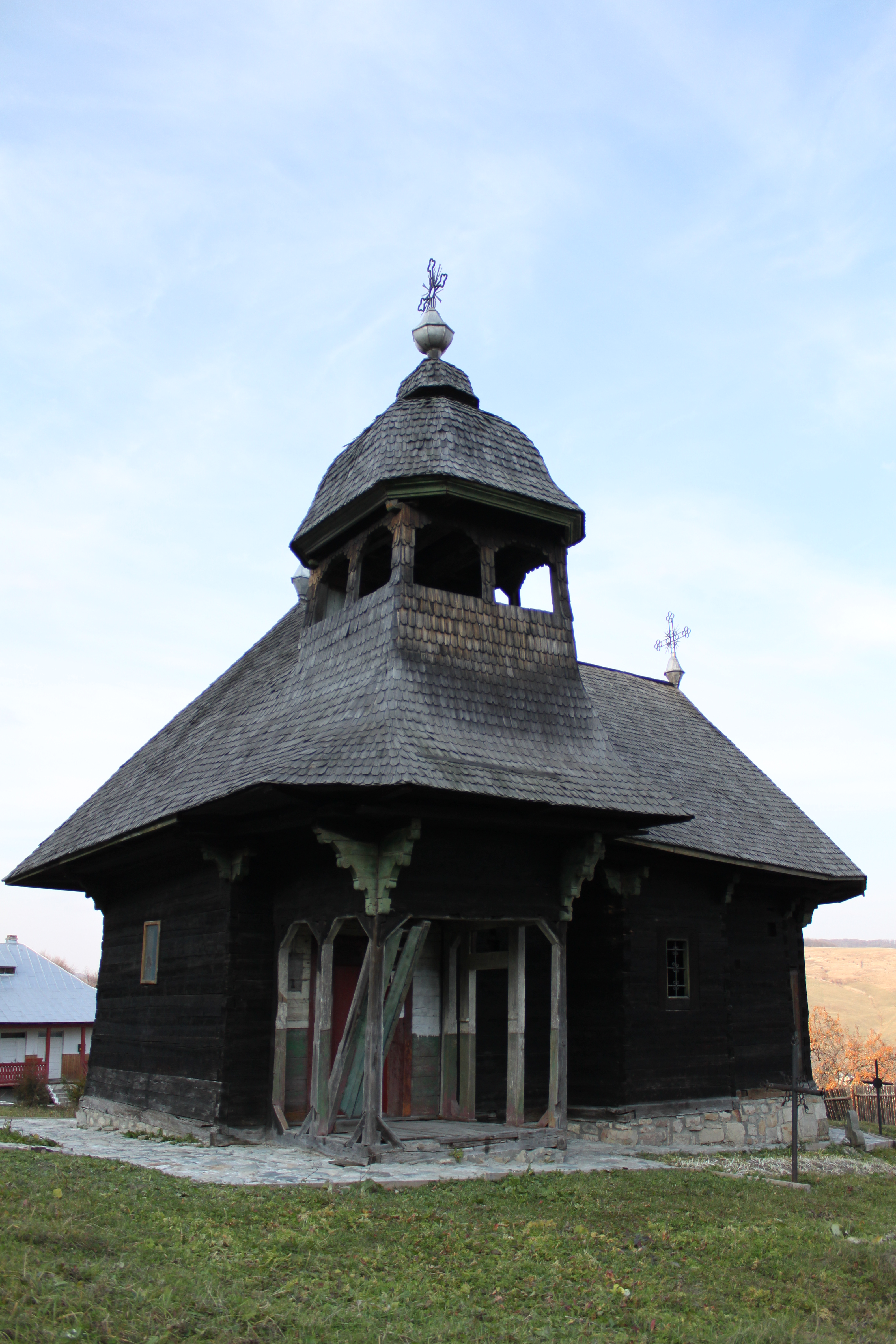 Biserica de lemn Buna Vestire din Piatra Neamţ, judeţul Neamţ. 01